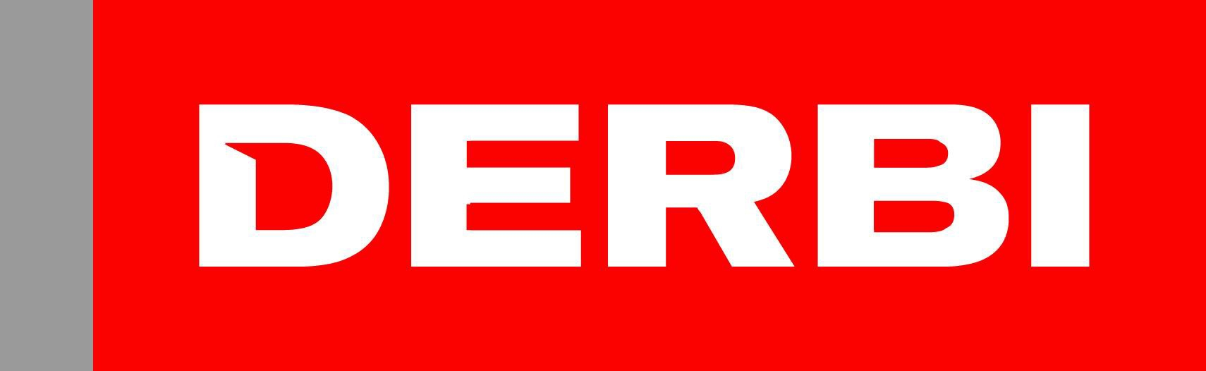 Attuale logo della Derbi